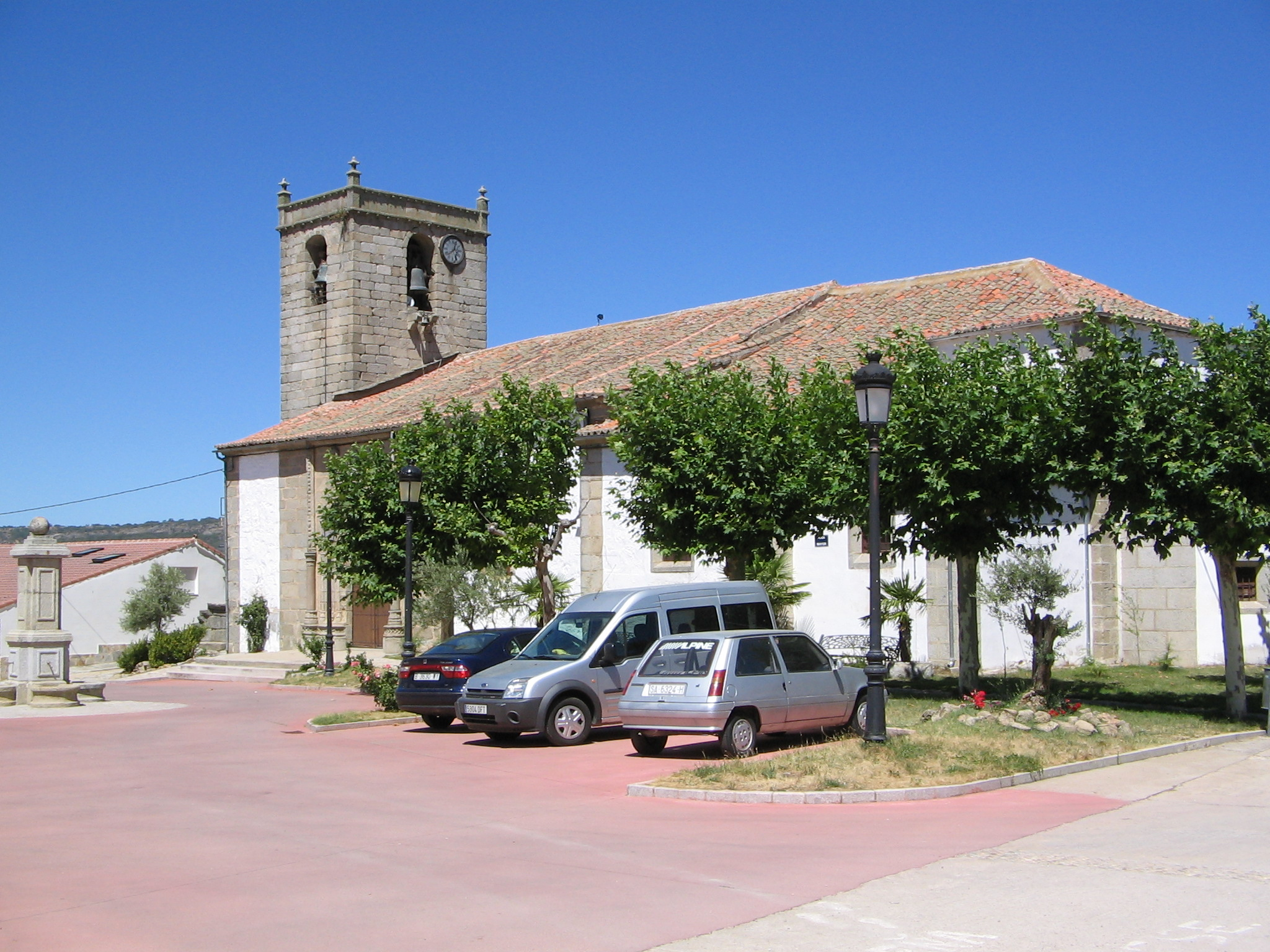 Fuentes de Béjar Iglesia de Nuestra Señora de La Purificación, con armadura mudéjar, una imagen del sagrado corazón de Jesús coronaba la torre.